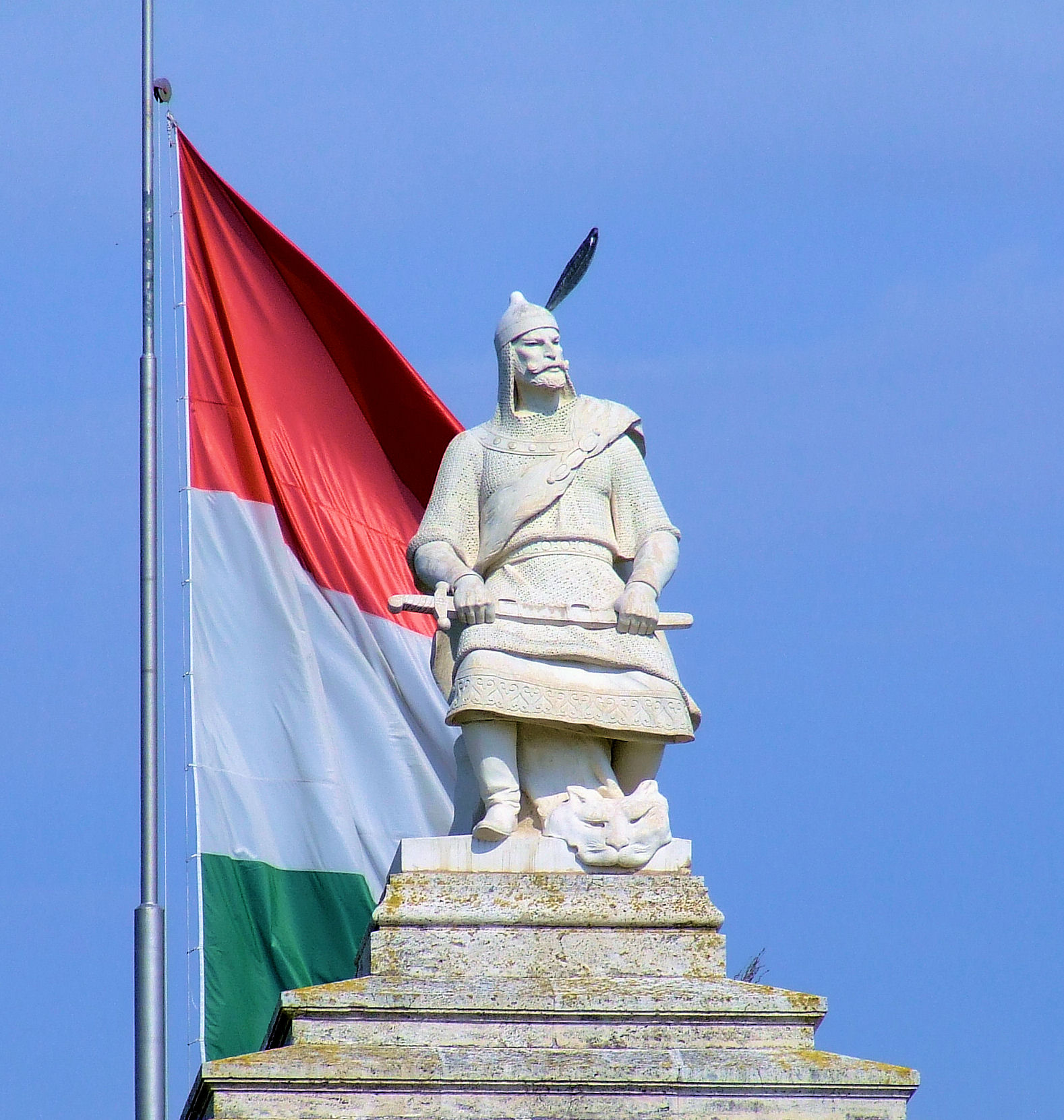 Az Árpád-emlékmű Ópusztaszeren. Berczik Gyula építész és Kallós Ede szobrászművész alkotása. A szobrot 1996-ban Buzál Károly faragta újra.